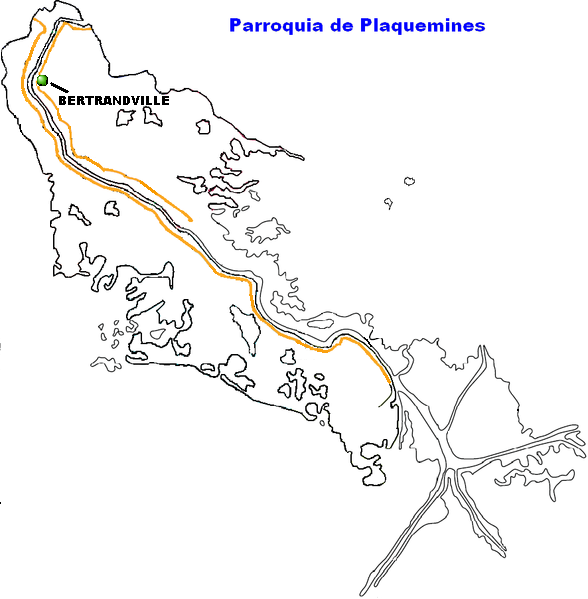 Bertrandville Louisiana